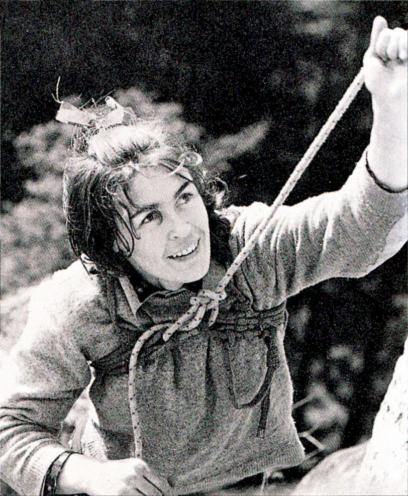 Wanda Rutkiewicz na Krzywej Turni w Sokolikach